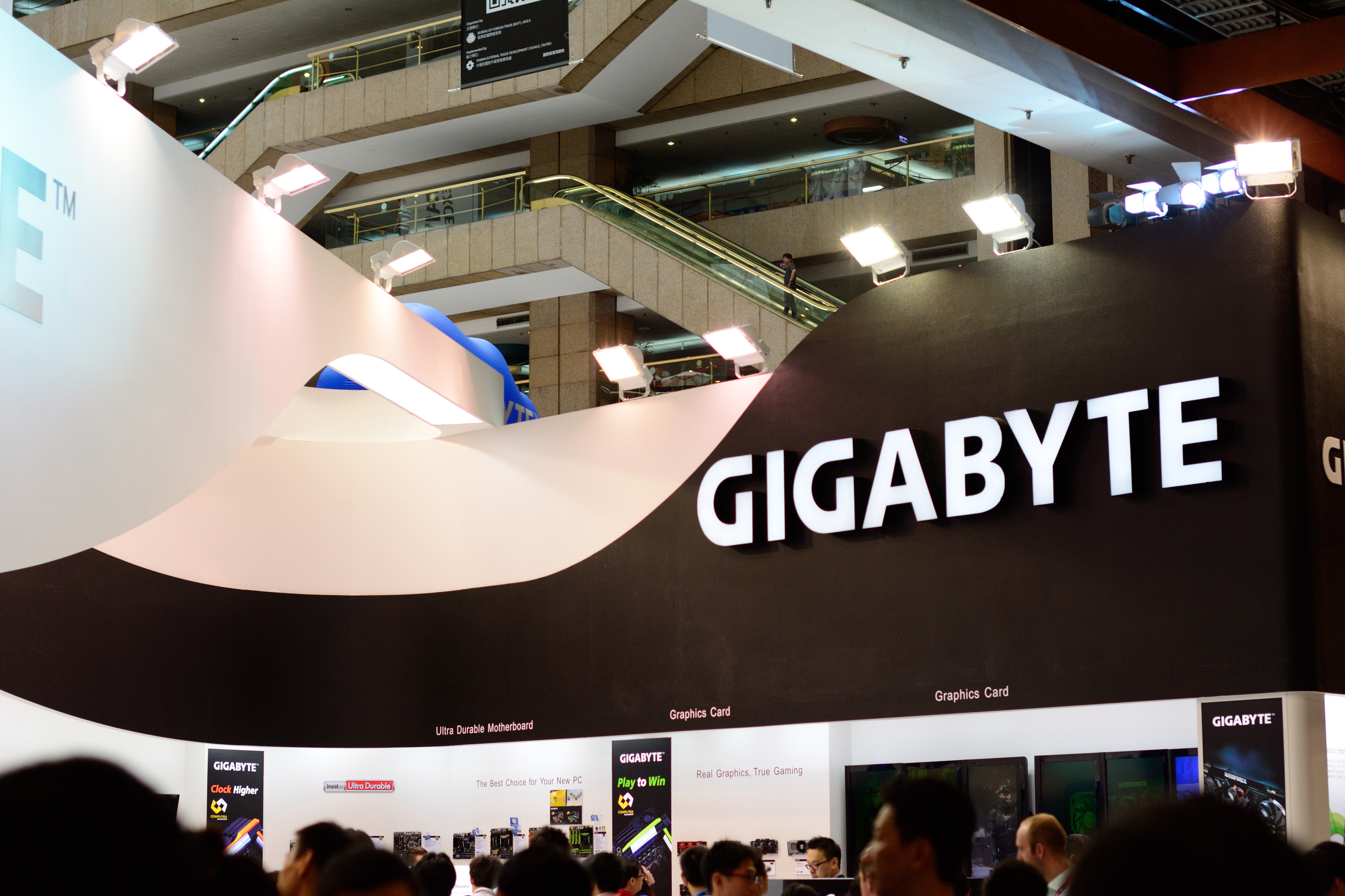 2013台北國際電腦展覽會，技嘉科技攤位。